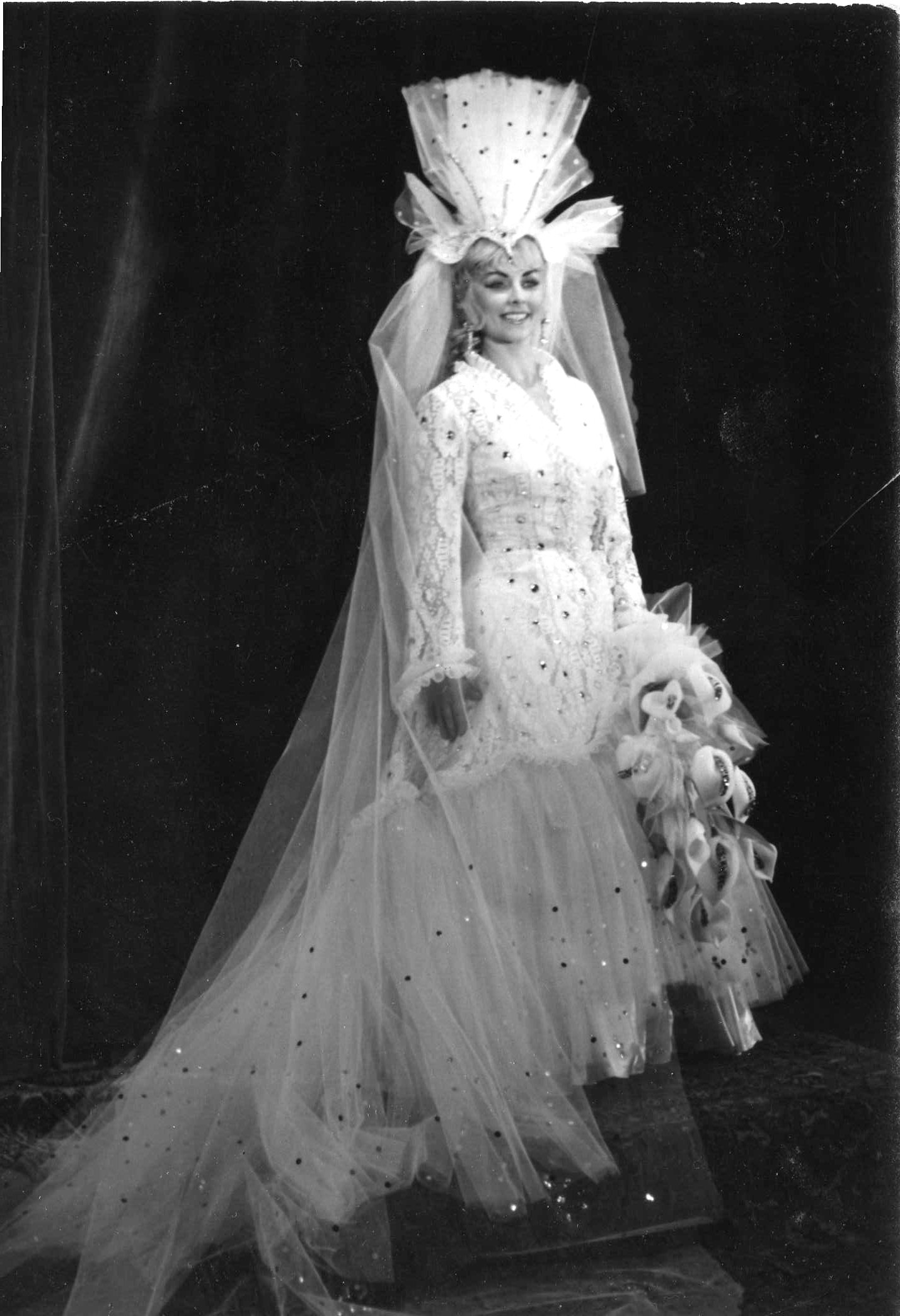 Katarina Meressova / Rose Marie